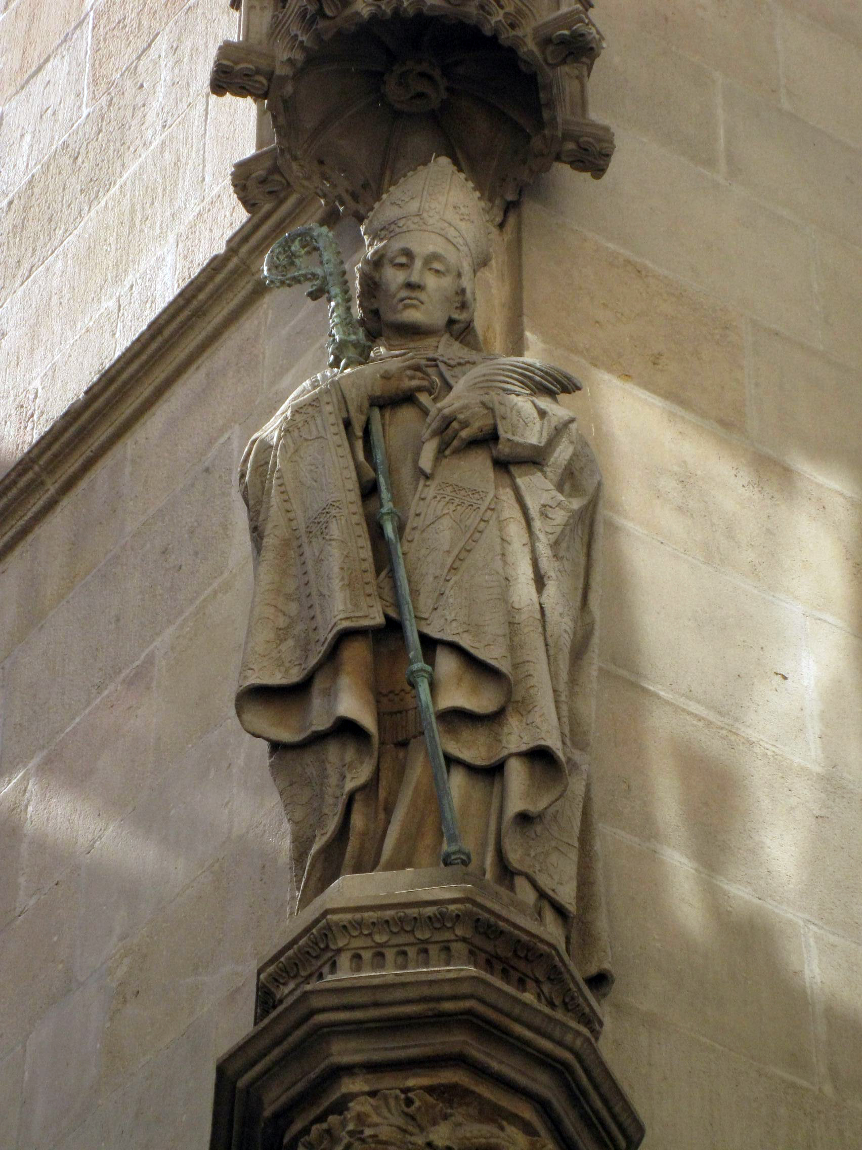 Sant Sever (Joan Flotats). C. Ciutat, 2 (Barcelona)